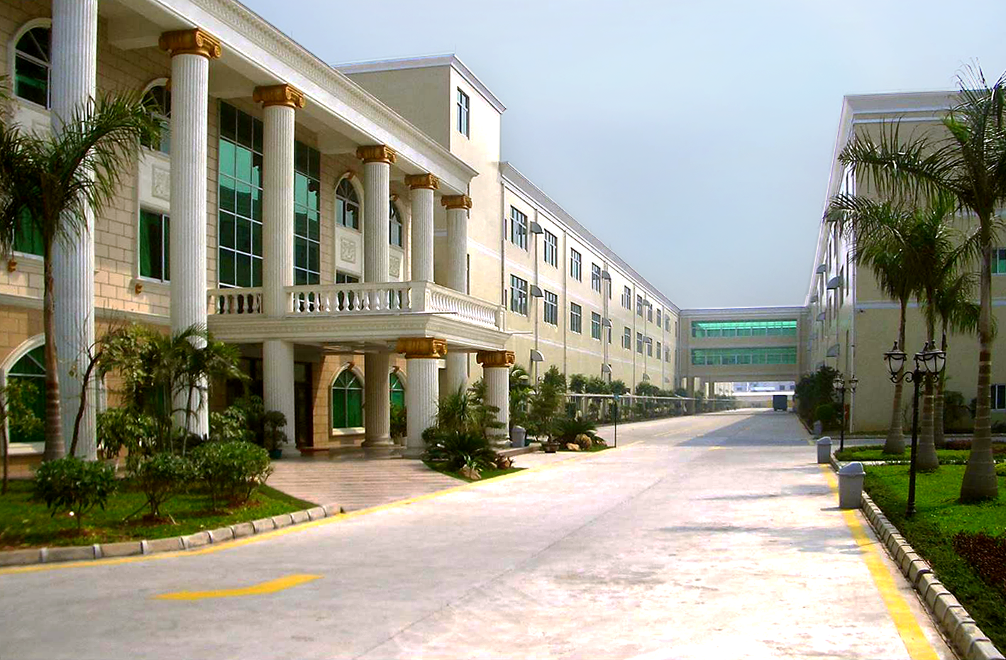 Produktionsgebäude in Dongguan, China